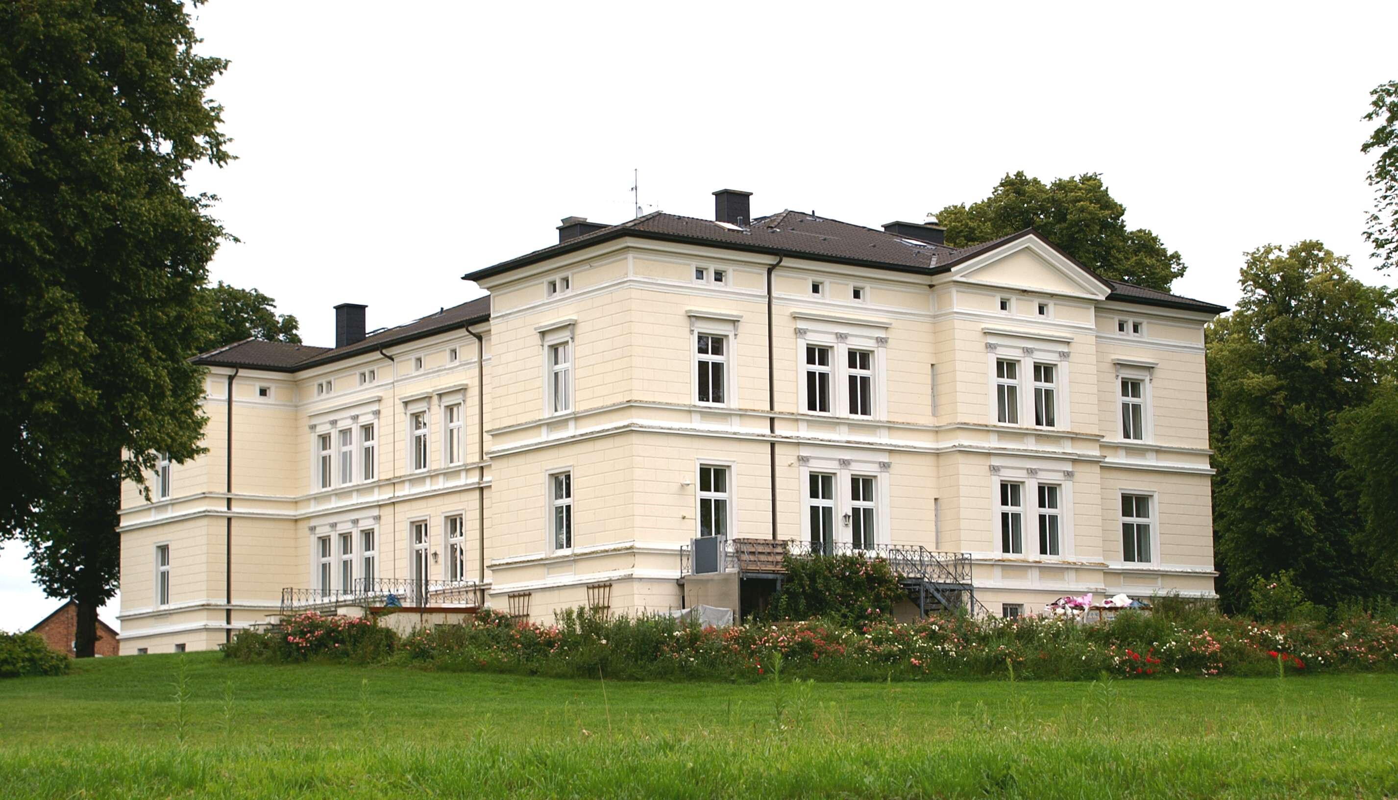 Vanselow - Landkreis Demmin - Herrenhaus - Parkseite